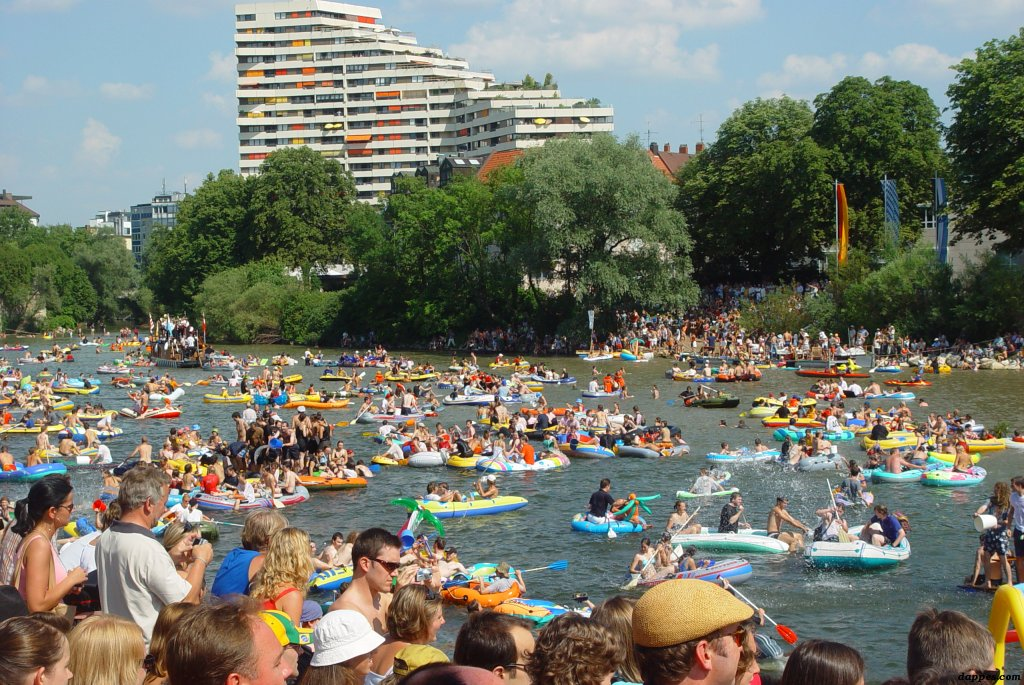 Traditionelles Nabada auf der Donau in Ulm am Schwoermontag 2006